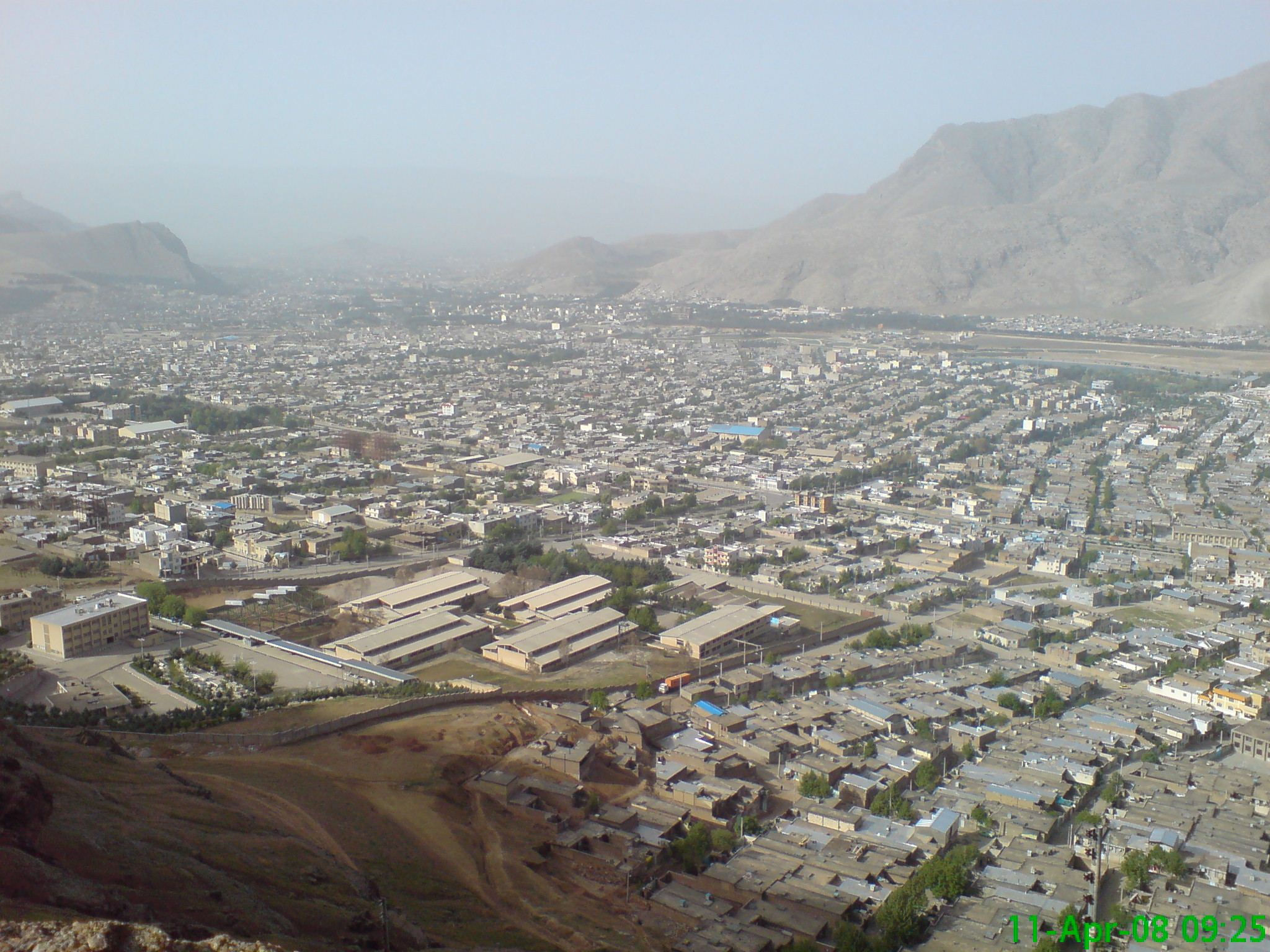 Khorramabad